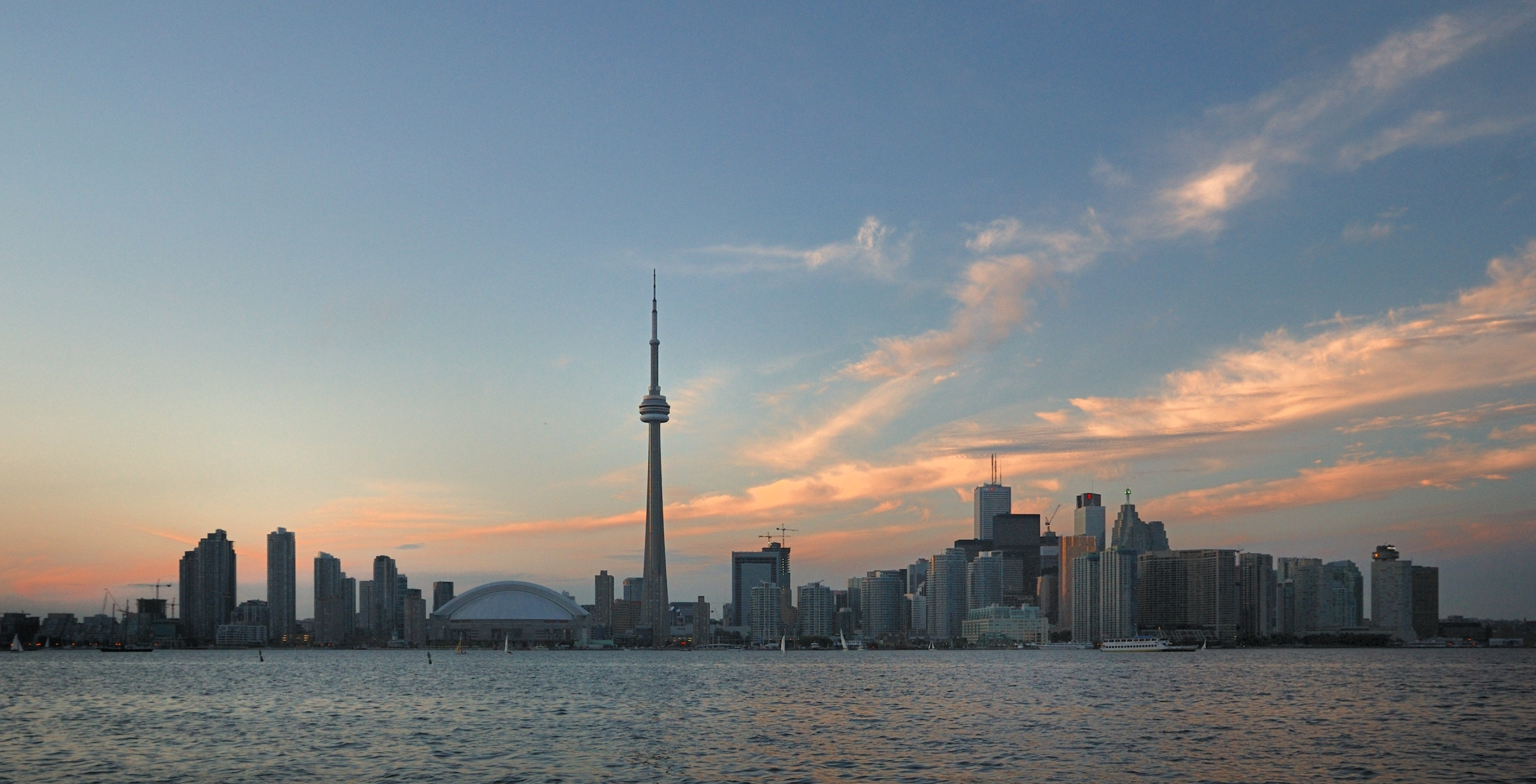 Skyline Torontos von Toronto Islands bei Abenddämmerung